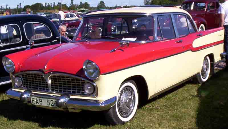 Ford Vedette ABXC Chambord 1958